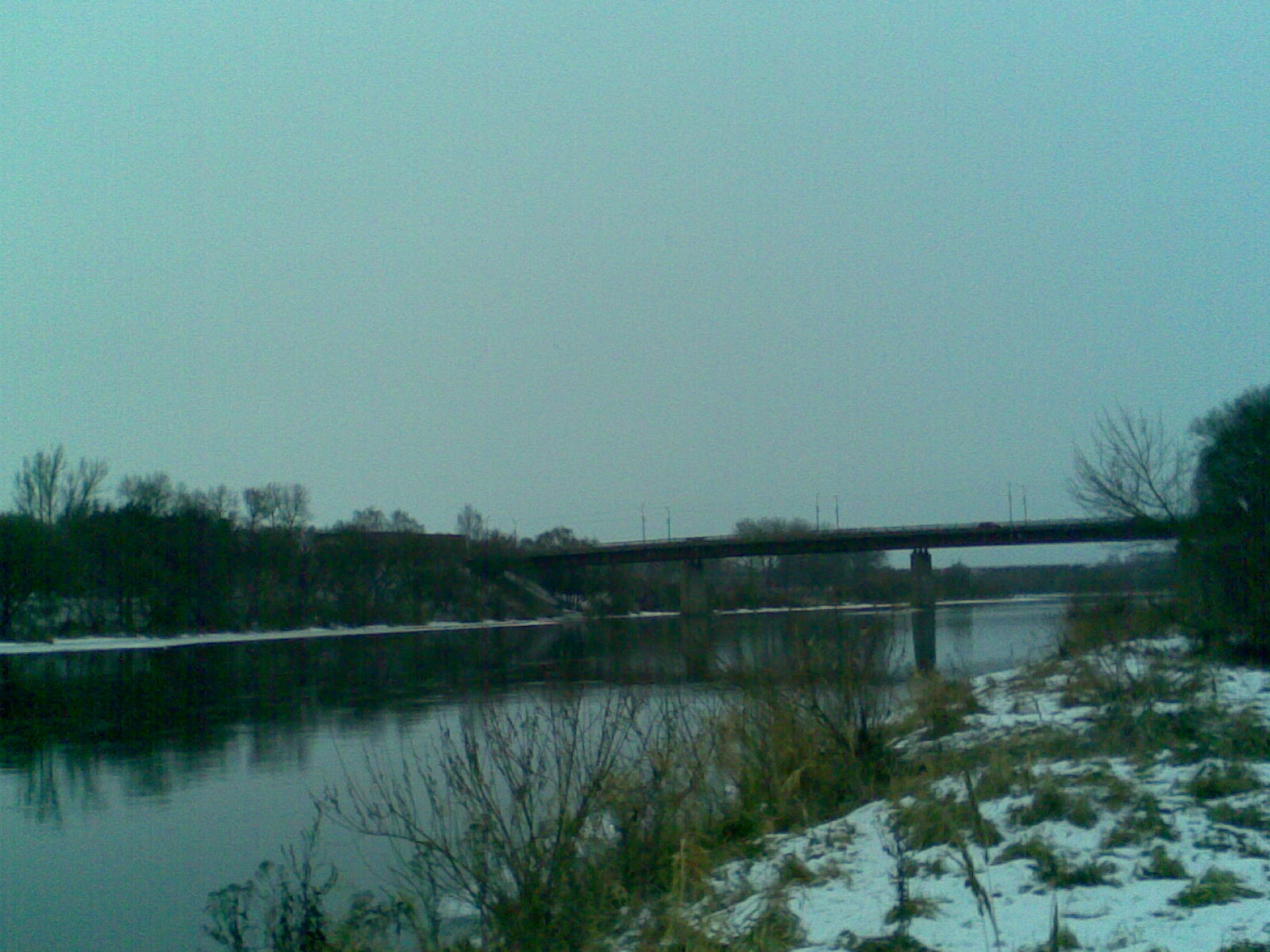 Jonavos tiltas